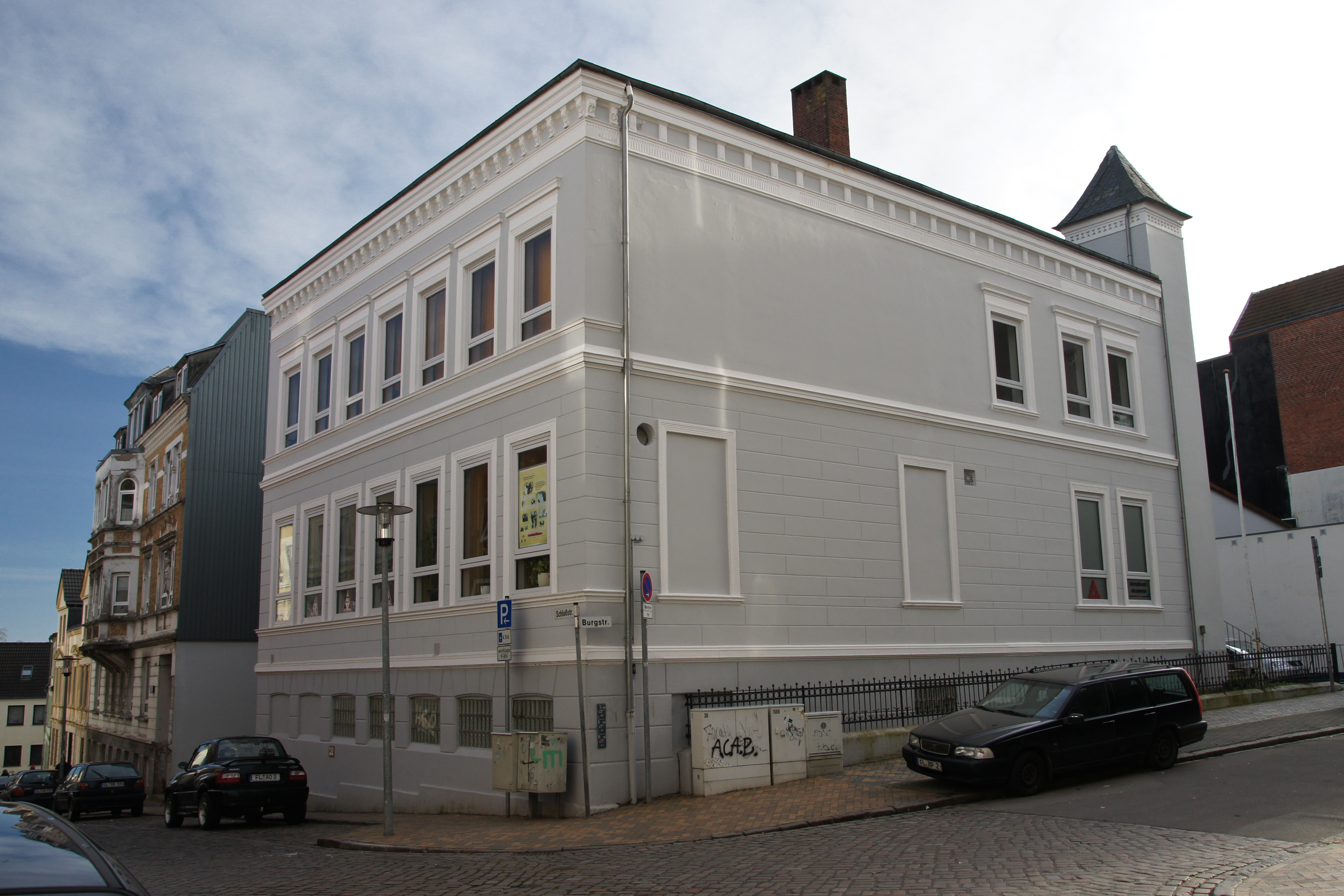 Flensburg-Neustadt, Schloßstraße 35, Guttempler Haus, Denkmal Nr. 19. Sicht auf Vorderseite Schloßstr./Burgstr.